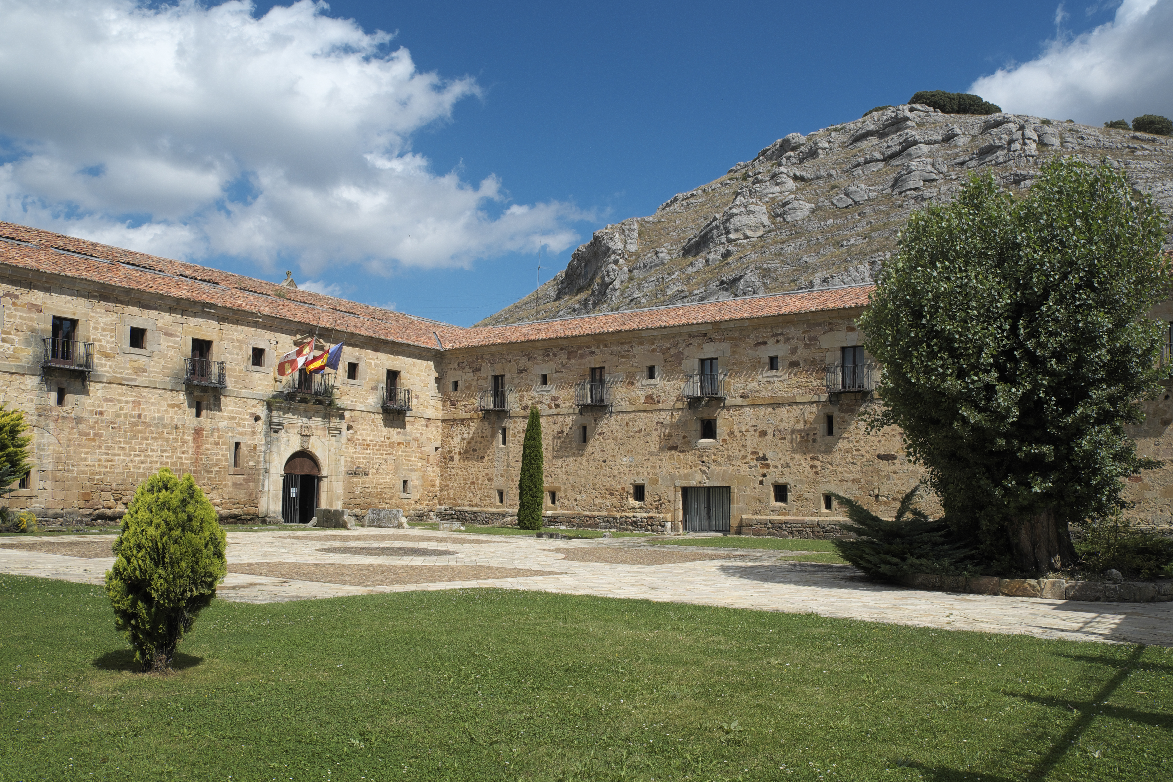 Ehemaliges Prämonstratenserkloster Santa María la Real in Aguilar de Campoo in der Provinz Palencia (Kastilien-León/Spanien), Klostergebäude aus dem 17./18. Jahrhundert